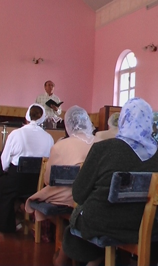 На зібранні баптистської громади в Ізяславі.